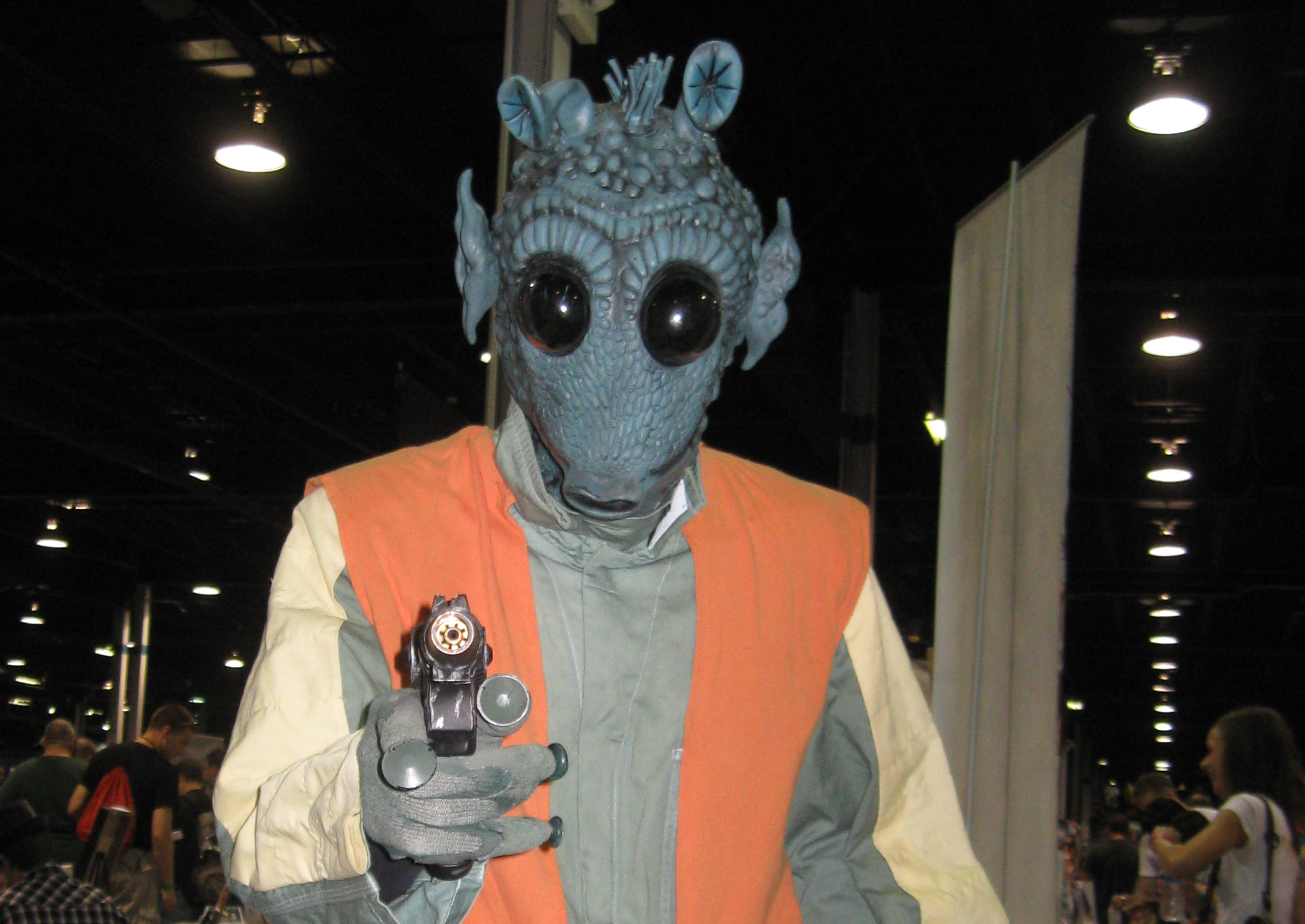 Greedo Cropped